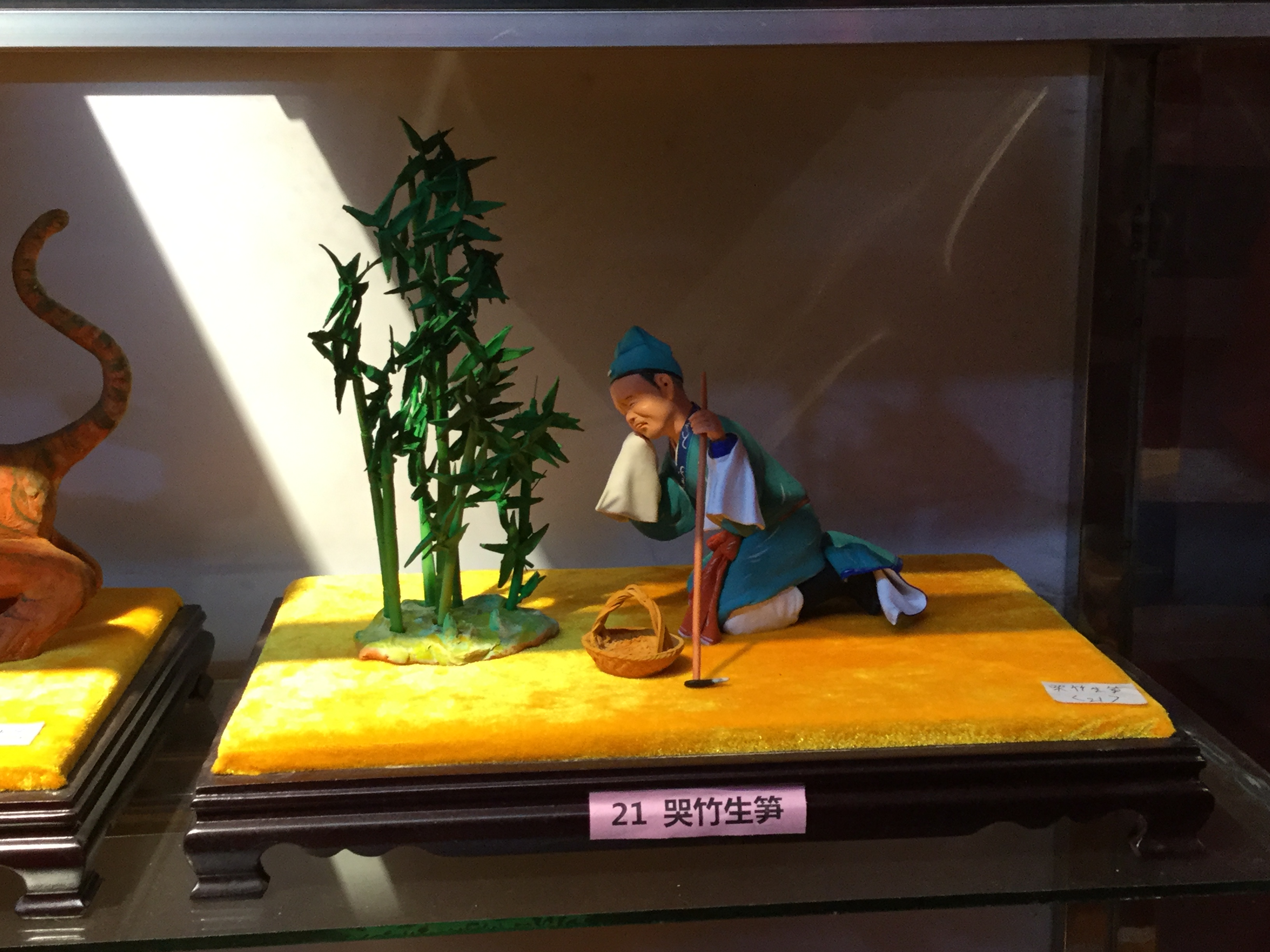 翁仔灯《哭竹生笋》，摄于2018年3月2日。